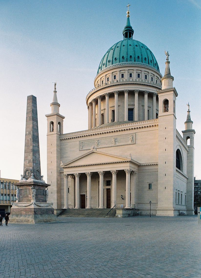 Nikolaikirche Potsdam Südansicht nach der Hülleninstandsetzung 2010 Die jetzige Farbfassungsrekonstruktion der Fassade der Nikolaikirche mit dem Dreifarbenwechsel der Putzquader ist durch den 2003 an der Ostfassade vorgegebenen zu hellen ockerrötlichen Farbton eine Anlehnung an den Befund der 2. Fassung von 1848. Die Verteilung an den Fassadenflächen erfolgte stellenweise nach Befund und anhand eines Zufallsprinzips mit dem Würfel. Bis auf die Schrifttafel der Südfassade erhielten die Putz- und Sandsteinoberflächen eine Kalkkaseinanstrichbeschichtung. Restauratorische Untersuchung Bestands- und Zustandskartierungen, Dokumentation und baubegleitende Betreuung, Textautor Dipl.- Restaurator Gottfried Grafe